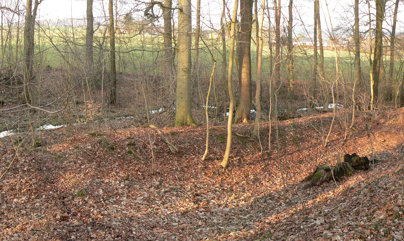 Hamelner Landwehr als Wall und davor der Bachlauf der Krummen Beeke bei der Holtenser Warte